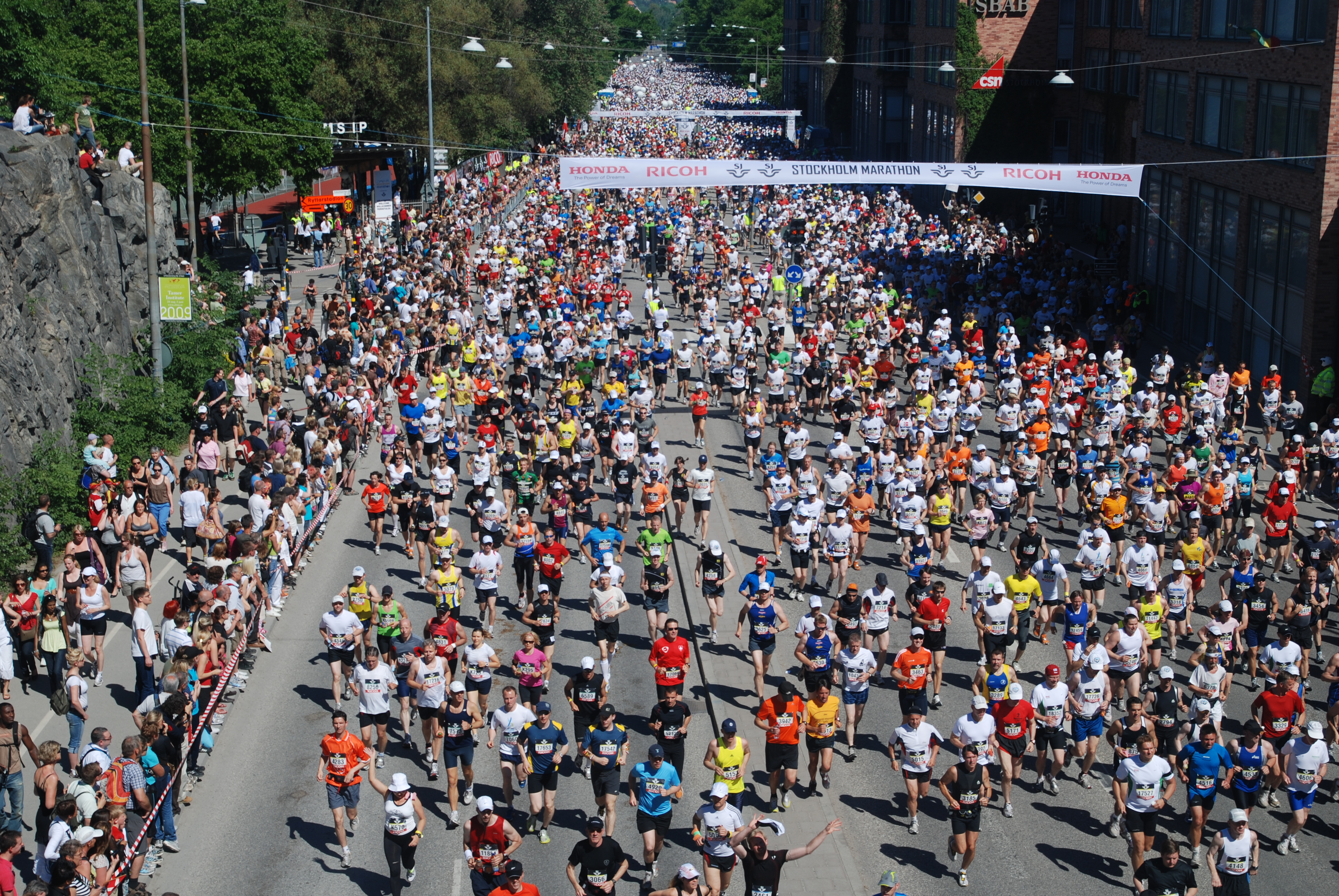 Start des Stockholmmarathons 2009